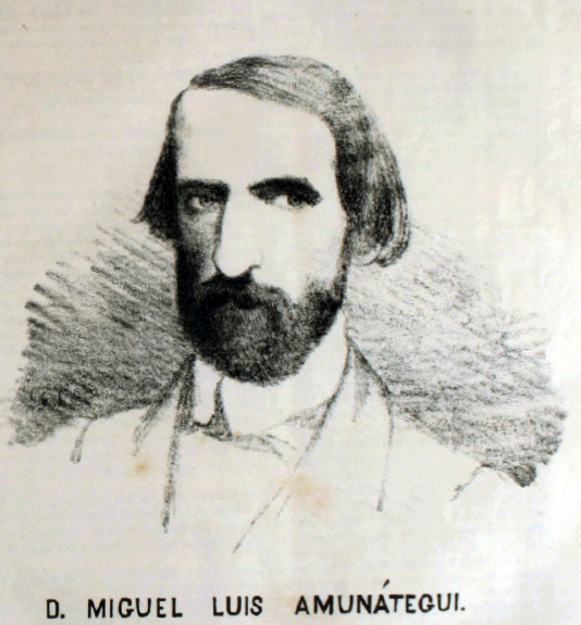 Miguel Luis Amunátegui Aldunate (Santiago; 11 de enero de 1828- Santiago; 22 de enero de 1888), historiador y político chileno, hermano del también destacado historiador, Gregorio Víctor Amunátegui Aldunate.